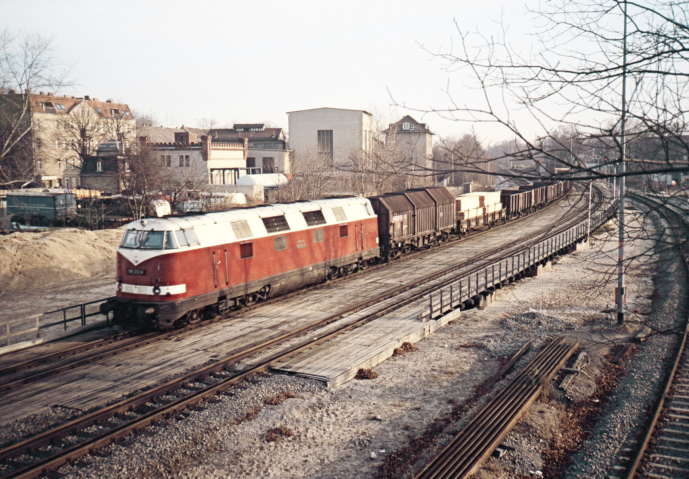 DR V 180 bei Einfahrt in den Bahnhof Tegel